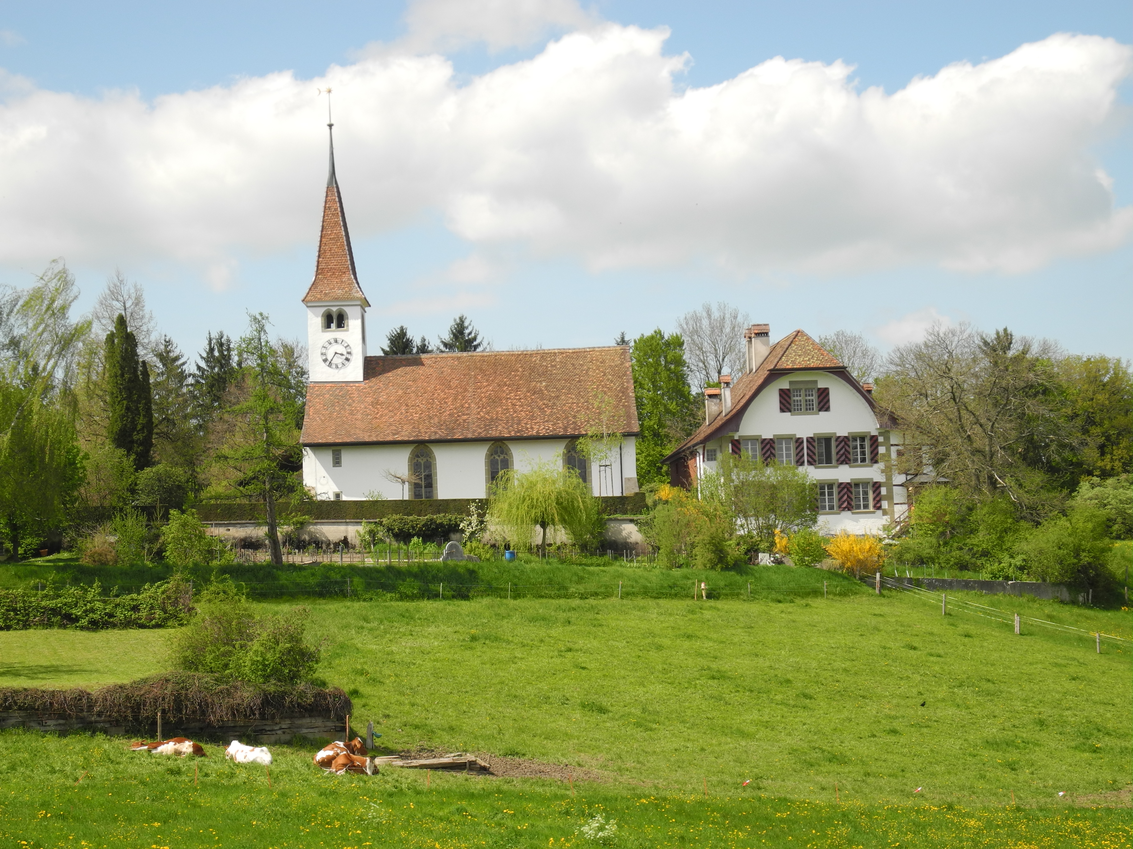 Kirche Frauenkappelen mit Pfarrhaus und Ofenhaus